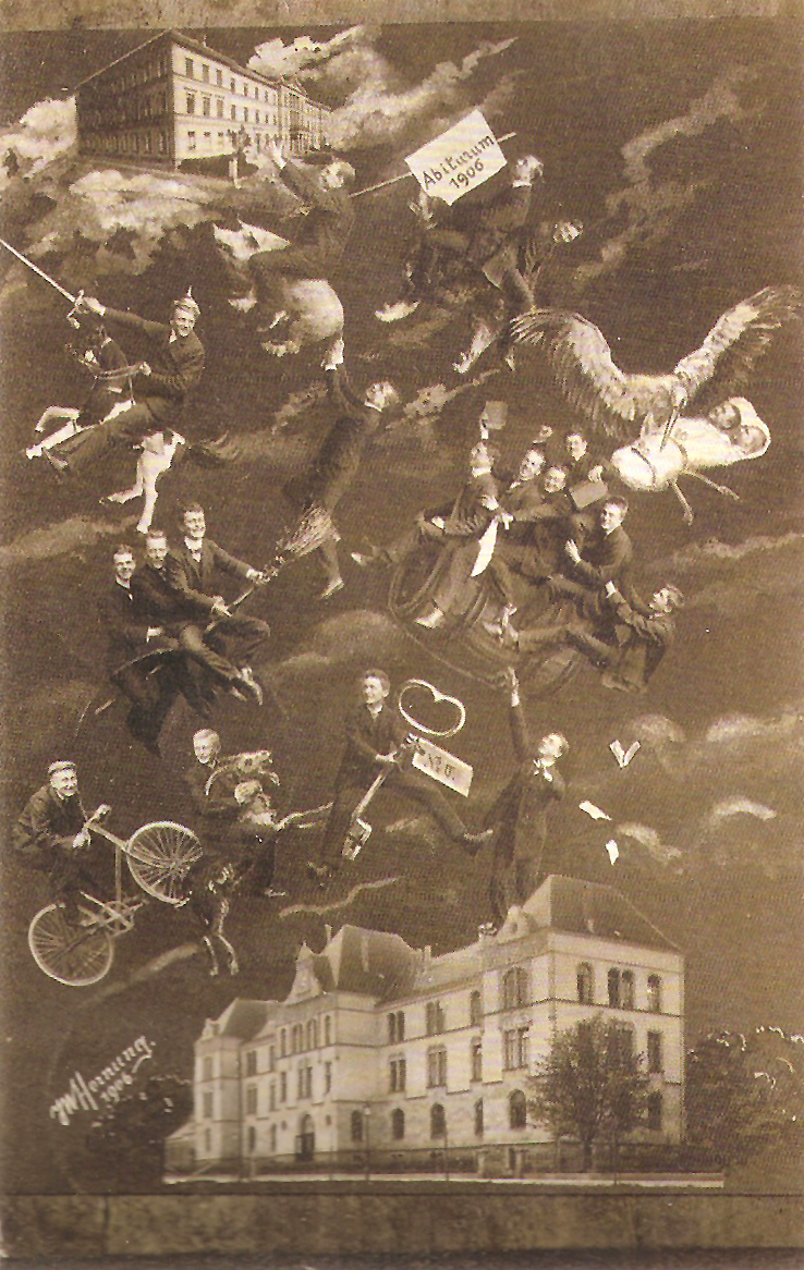 Postkarte anlässlich des bestandenen Abiturs, Tübingen 1906. Die Abiturientenfotos befinden sich zwischen dem Gebäude des Gymnasiums (unten) und der Neuen Aula, dem Hauptgebäude der Universität Tübingen (oben).